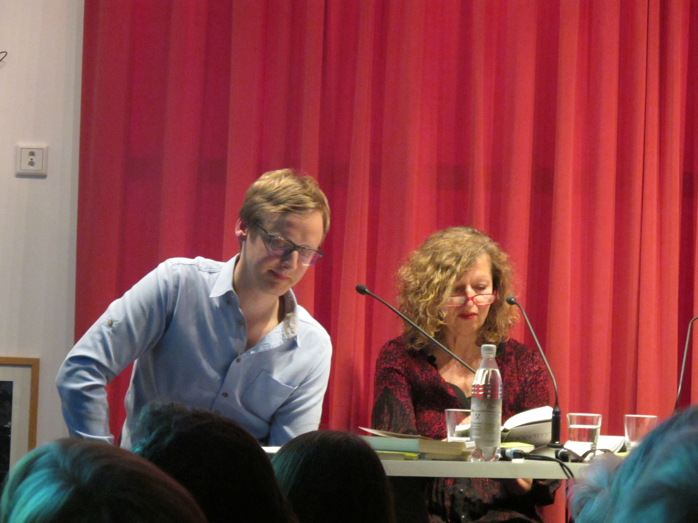 Das Lyrische Quartett im Lyrik Kabinett, Das Lyrische Quartett im Lyrik Kabinett, v.l.n.r. Florian Kessler, Kristina Maidt-Zinke